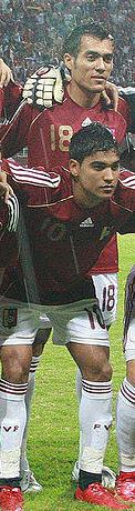 Arriba: Juan Arango, Abajo: Ronald Vargas